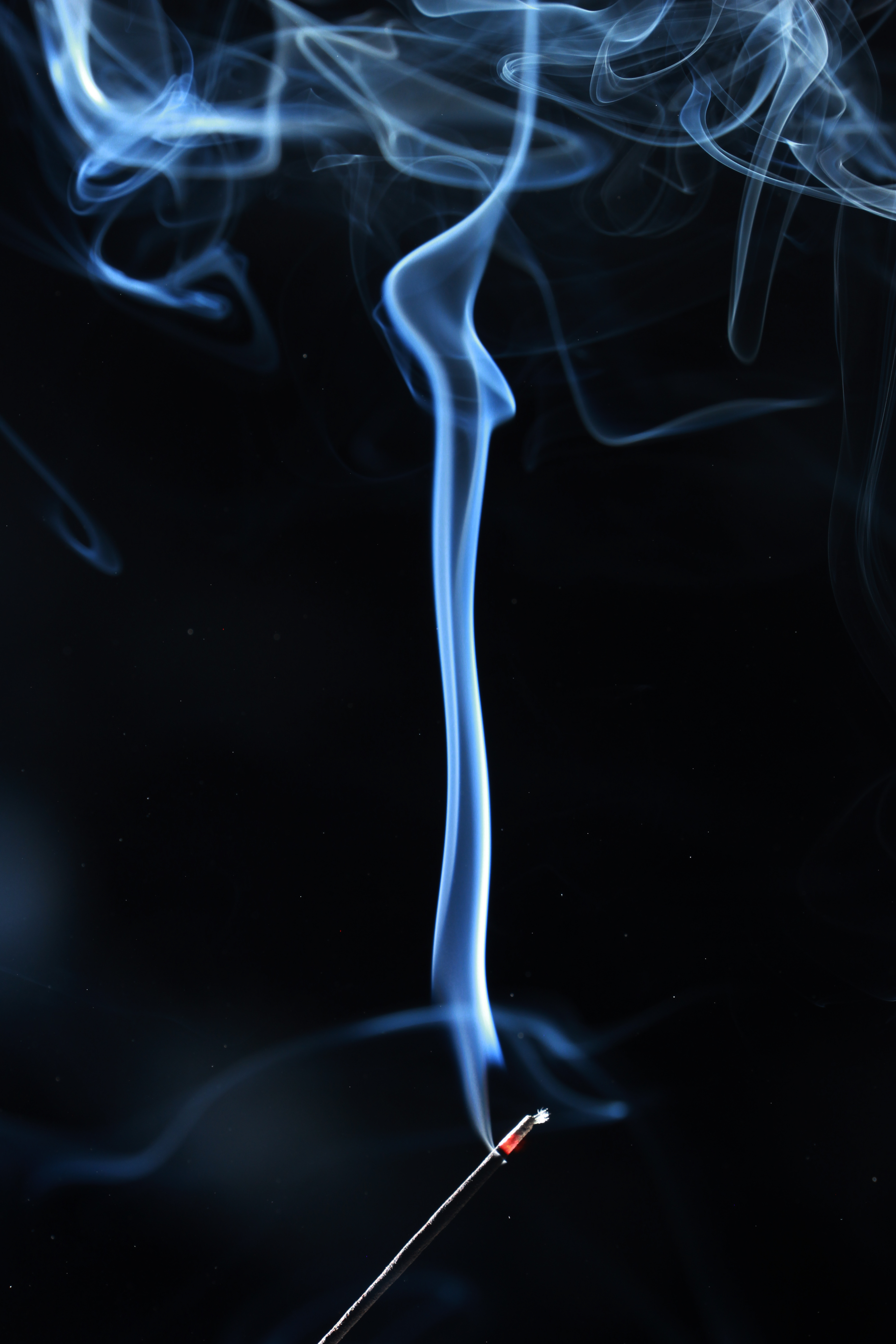 קטורת בצילום סטודיו incense in studio תודה לירדן סלמה שעזרה לי בביצוע התמונה